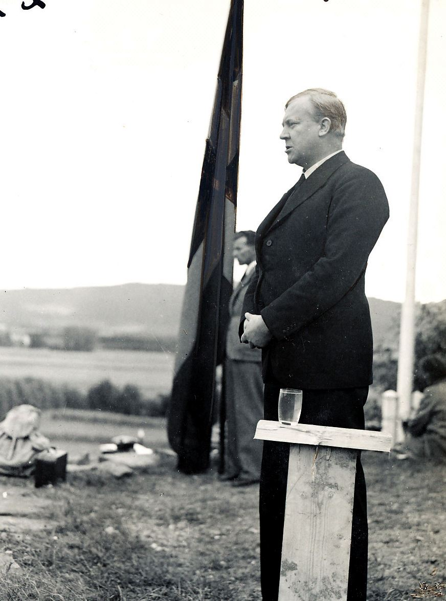 Quisling taler på Stiklestad, Olsok-Helgen 28.-29. juli 1934.